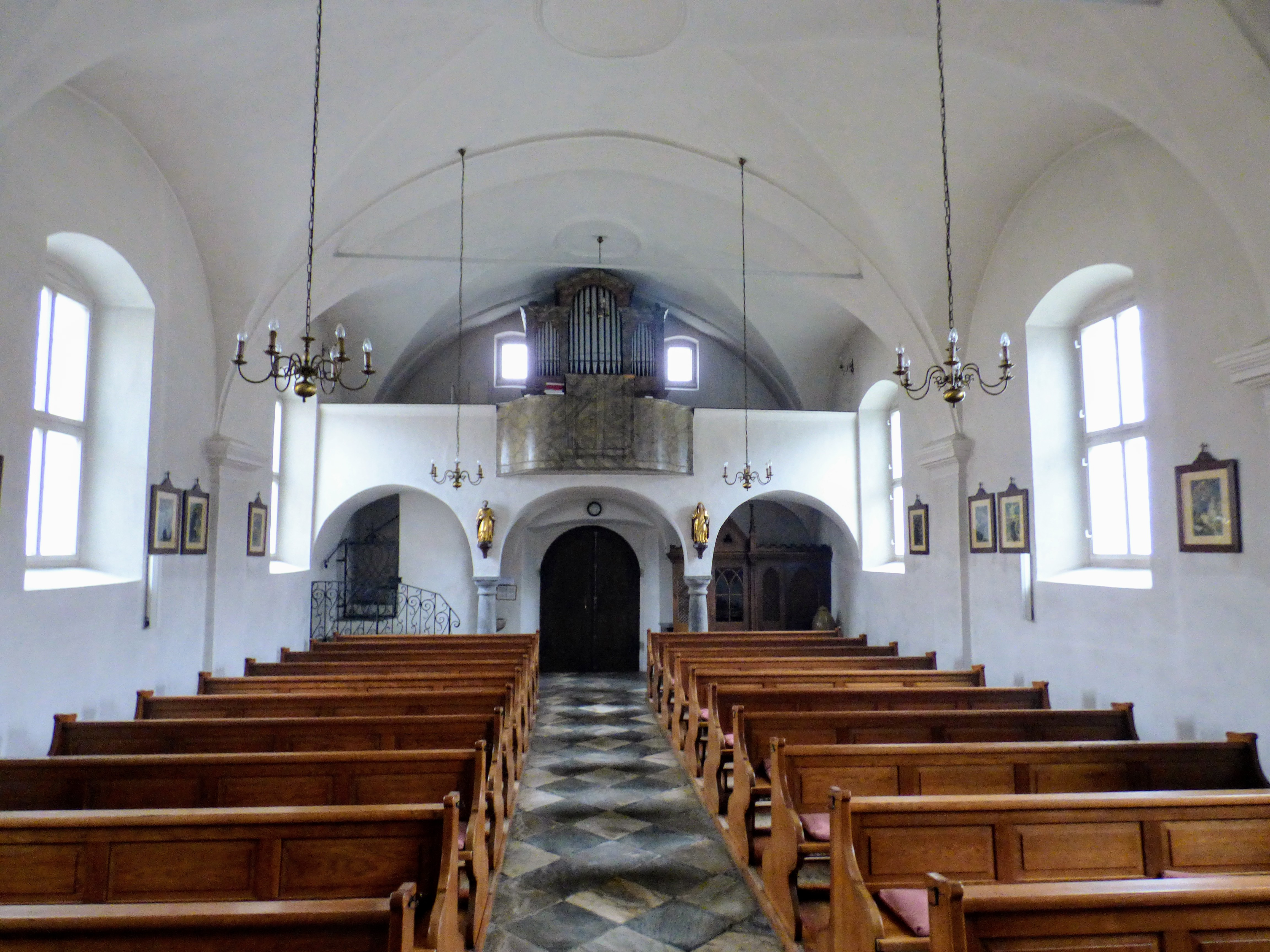 Inneres der Kirche St. Georgen am Sandhof (Klagenfurt)